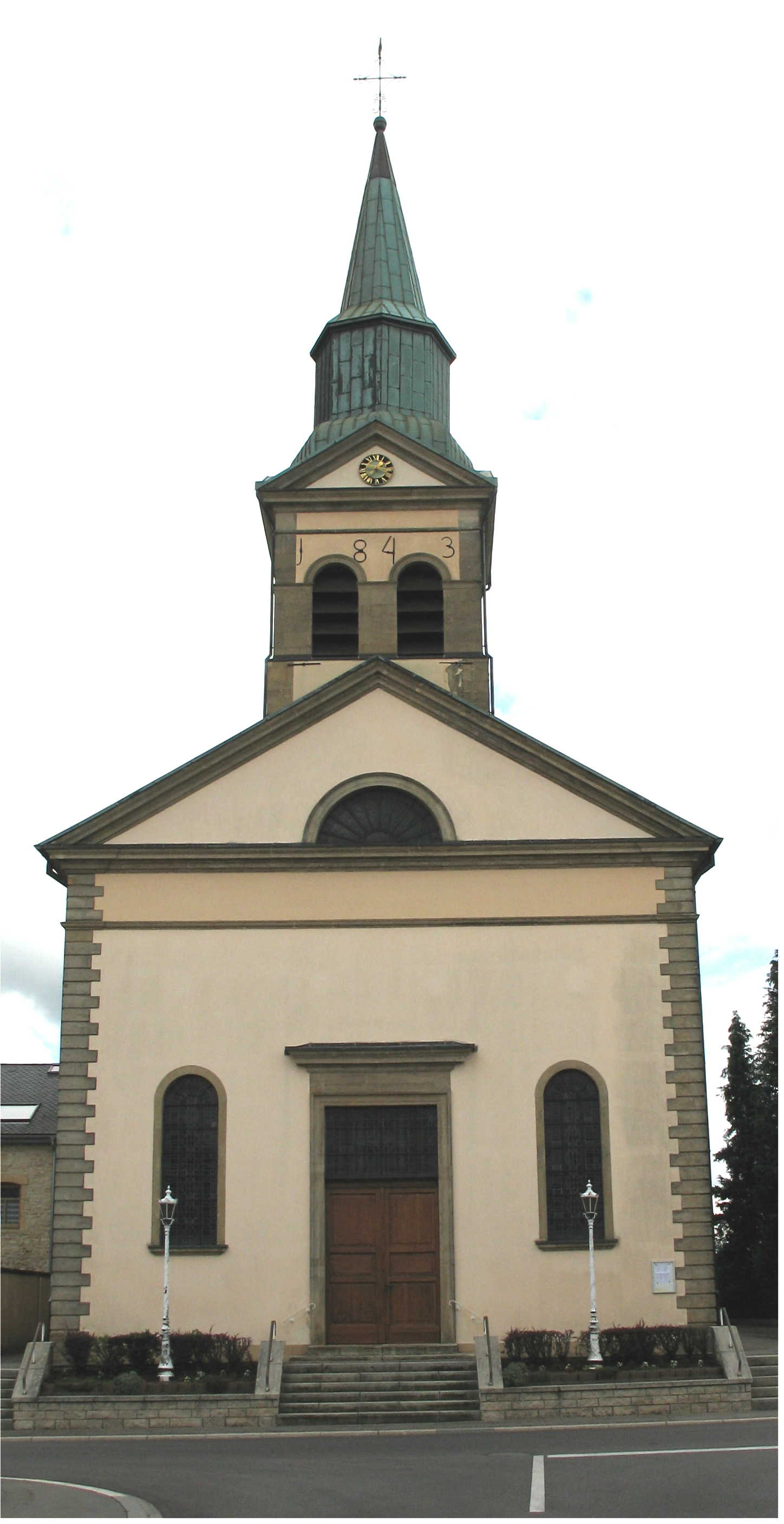 D'Kierch vu Keespelt.